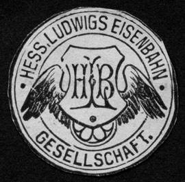 Siegelmarke der Hessischen Ludwigseisenbahn-Gesellschaft, die 1896 Teil der Preußischen Staatsbahnen wurde